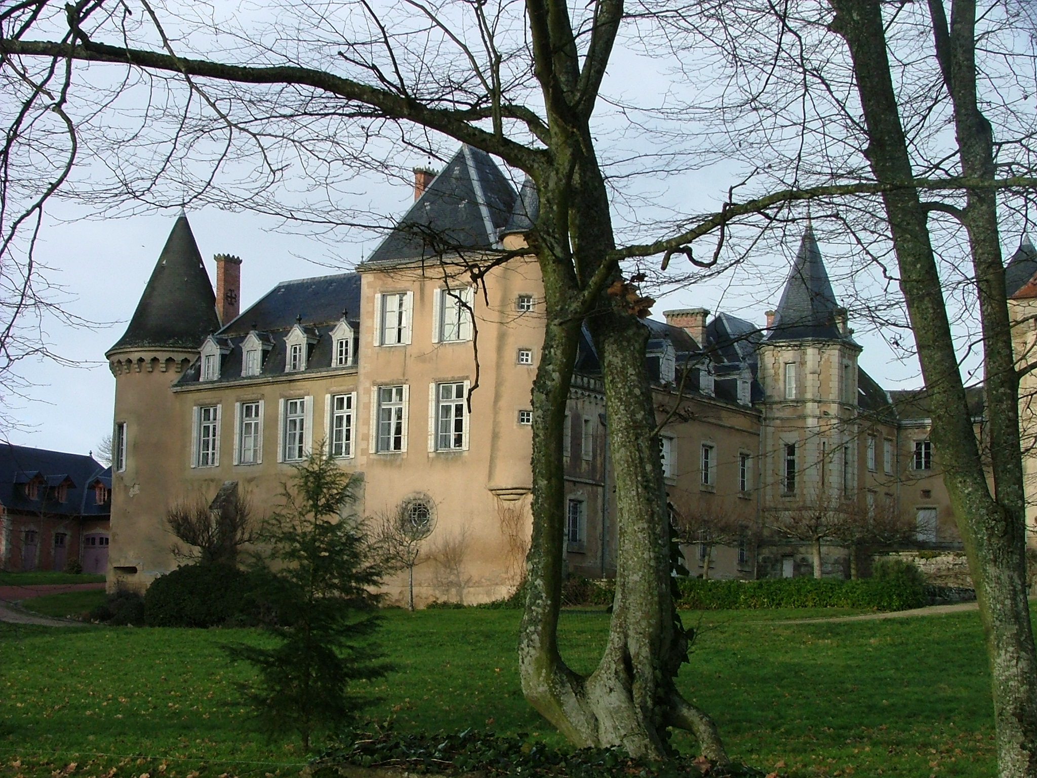 Château de Dracy les Couches, Saône-et-Loire, France Dracy les Couches castle, Saône-et-Loire, France